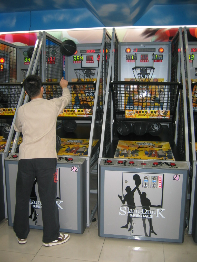 這是一張投籃機的照片，由mingwangx於2006年1月12日攝於台灣台北西門町。